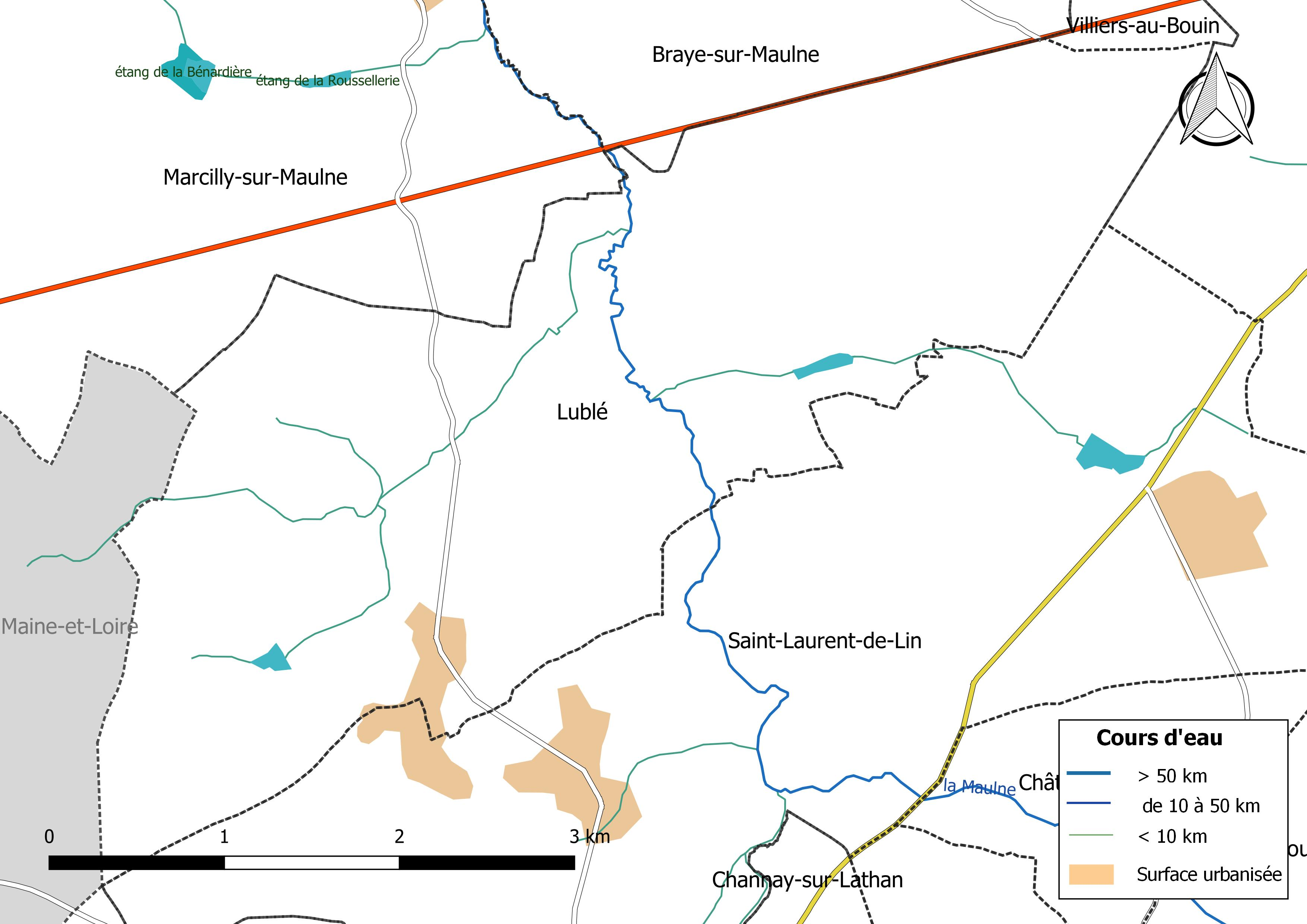 Carte du réseau hydrographique de la commune de Lublé (France).